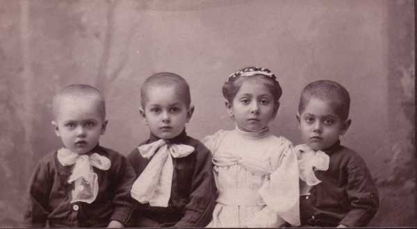 archive familiale